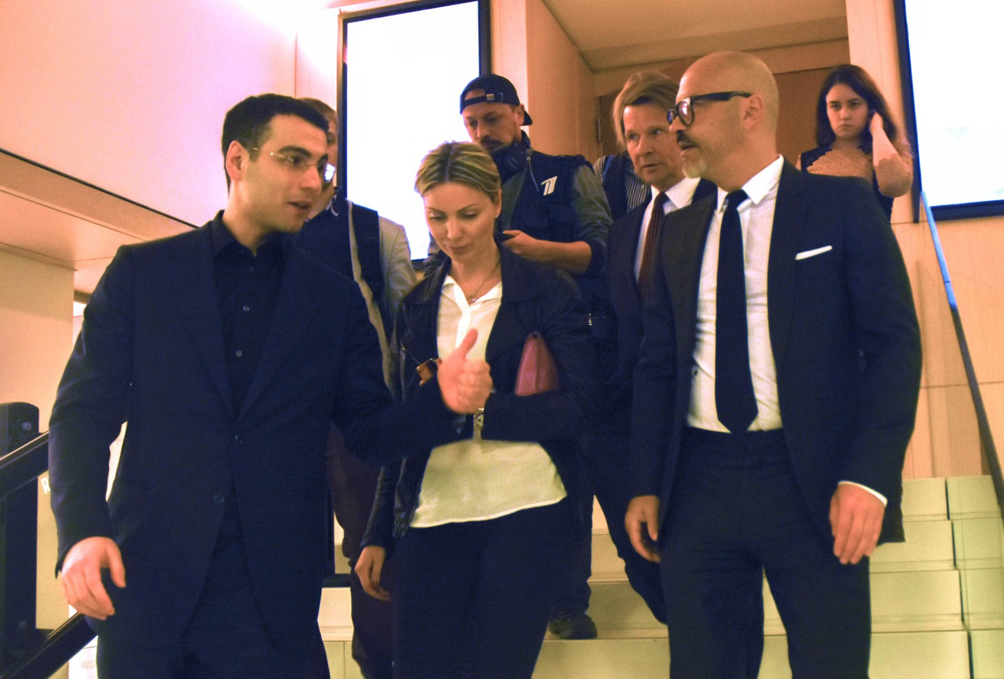 Большой зал ММЦ "Россия сегодня"